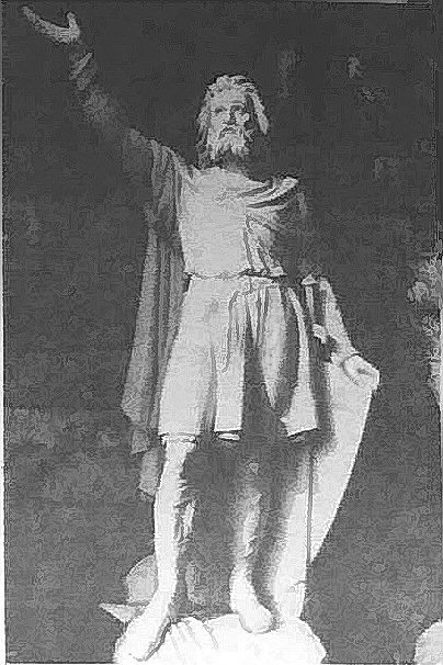 Statue d'Alain II de Bretagne, œuvre d'Amédée Ménard, dans la cour du château des Ducs de Bretagne à Nantes (1976). Photo (dans un journal, édité de 1978 à 1982 - édition août 1978), légèrement retouchée.